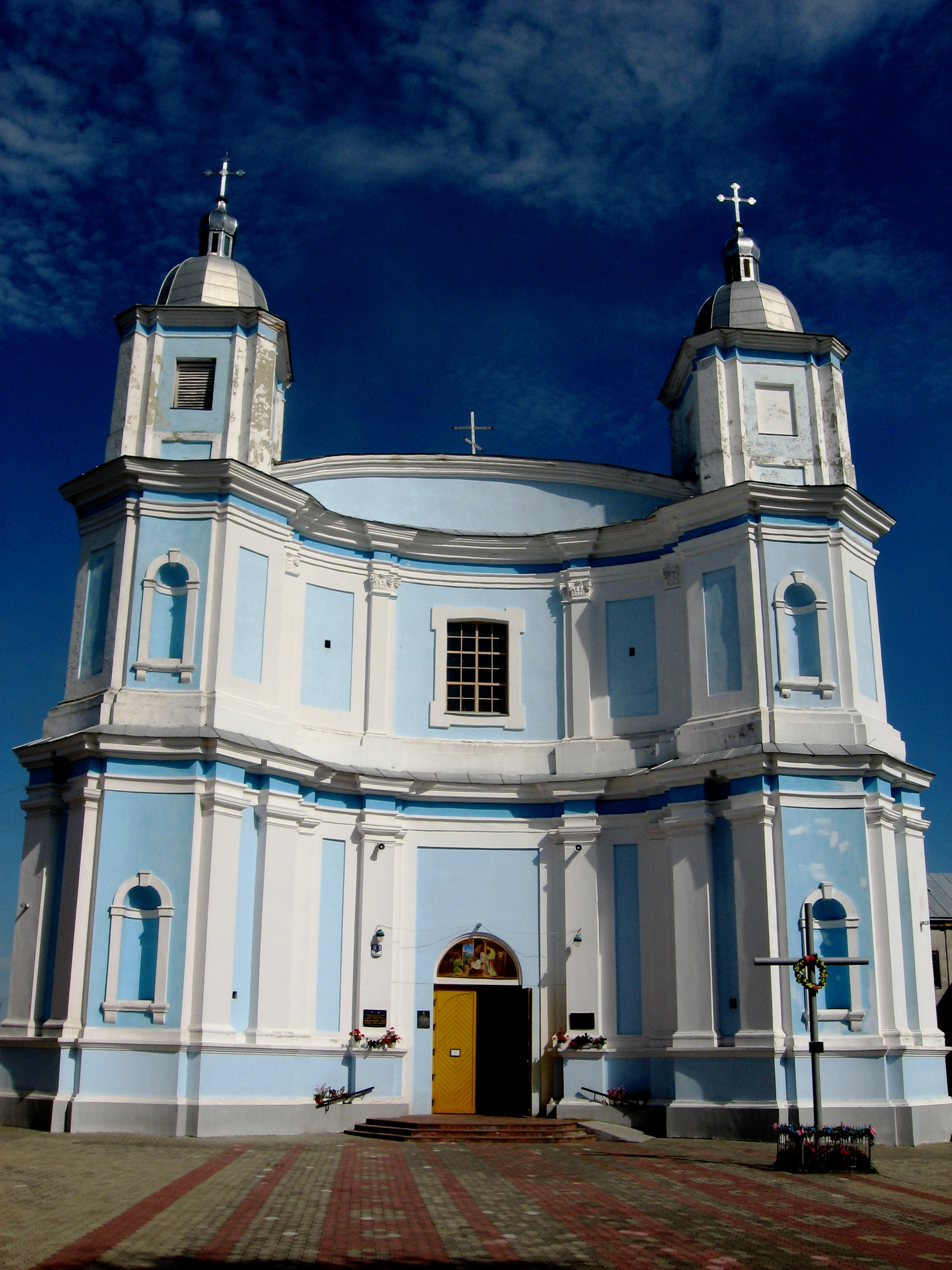 Володимир-Волинський. Костел Розіслання Апостолів (тепер Собор Різдва Христового)